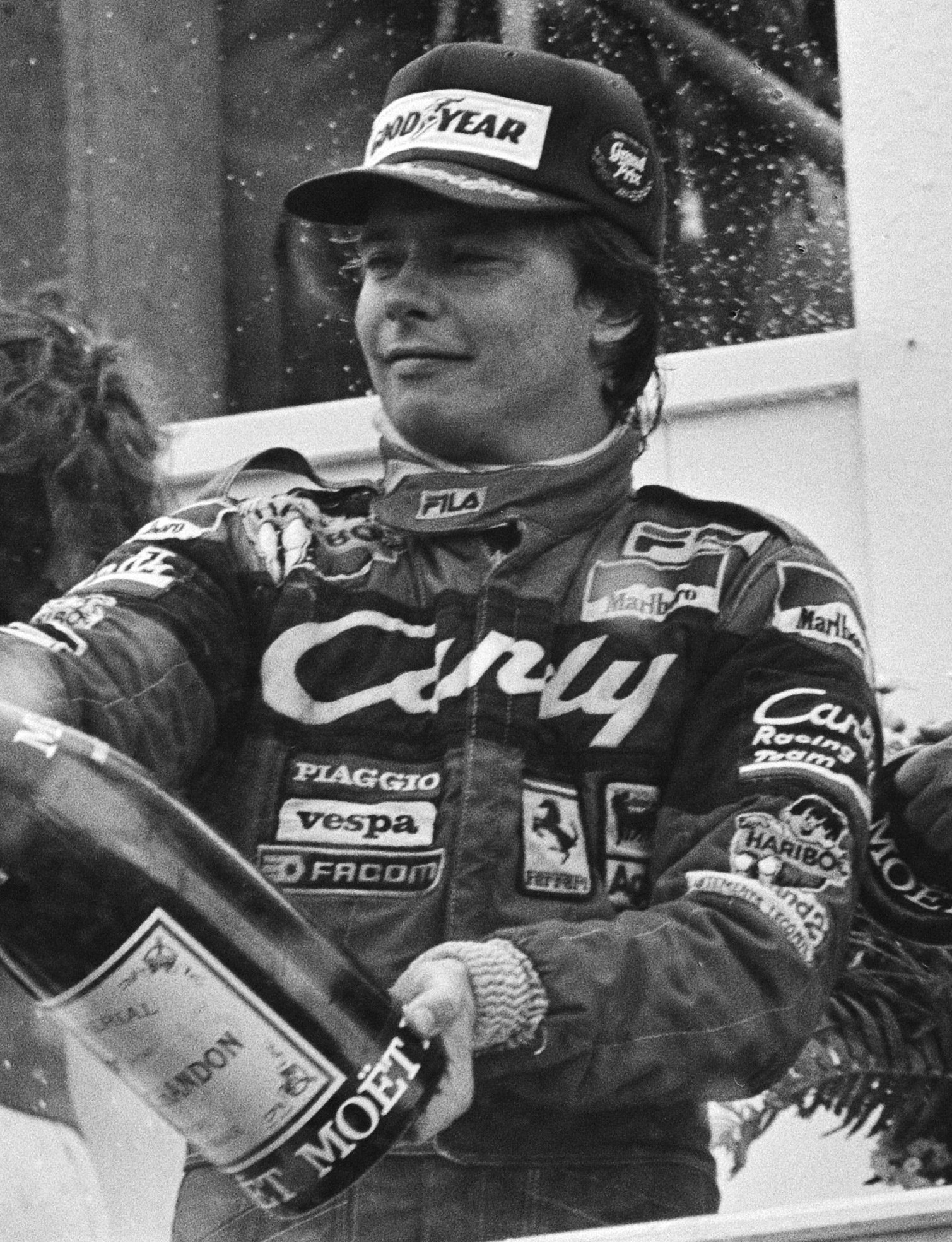 Grand Prix van Nederland te Zandvoort; winnaar Pironi me champagne.